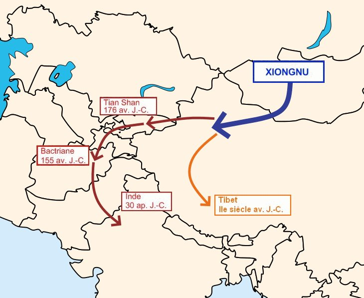 Migration des Yuezhi entre le 2e siècle av. J.-C. et le 1er siècle ap. J.-C.